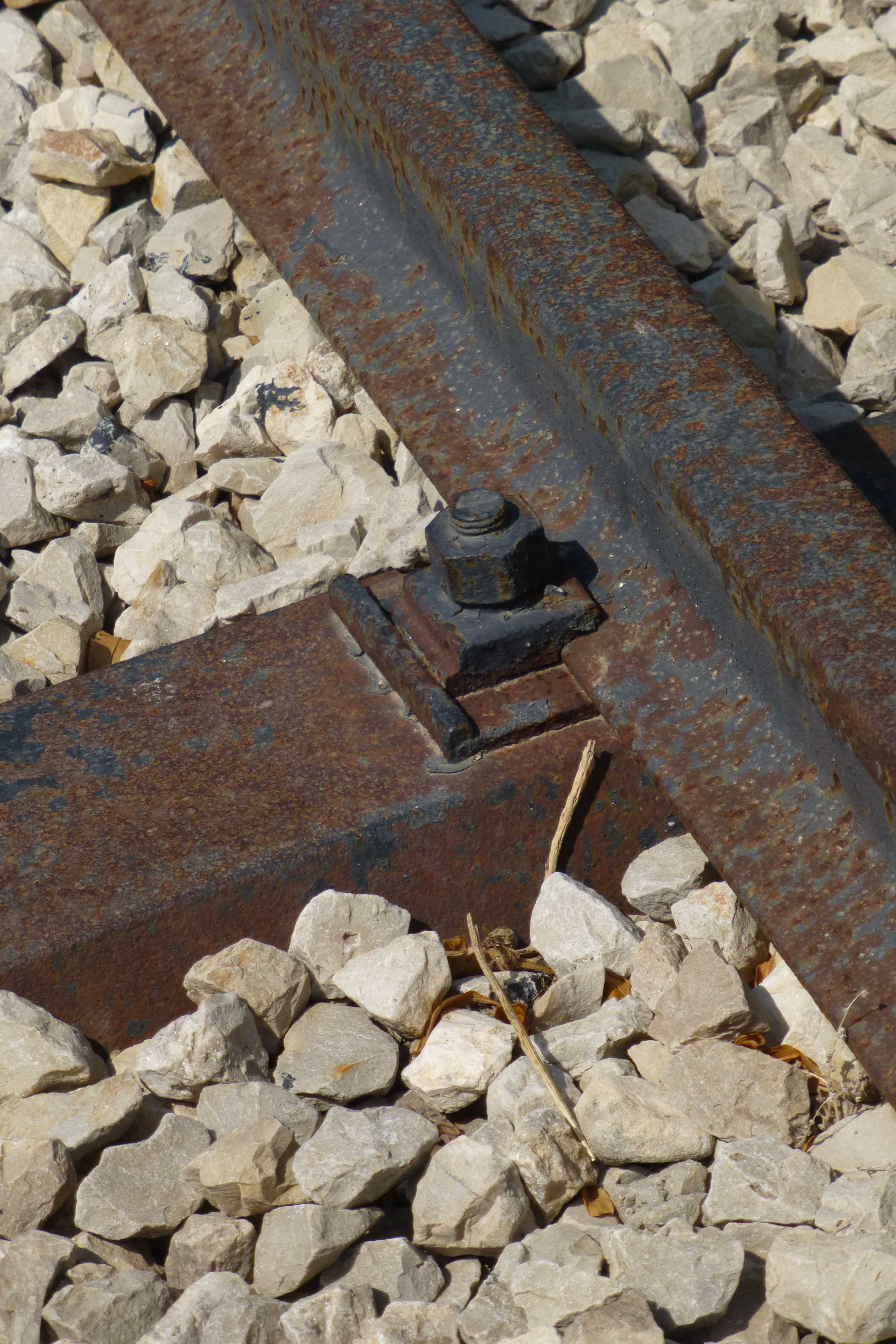 רכבת העמק - מעבירי מים והסוללה - צומת העמקים